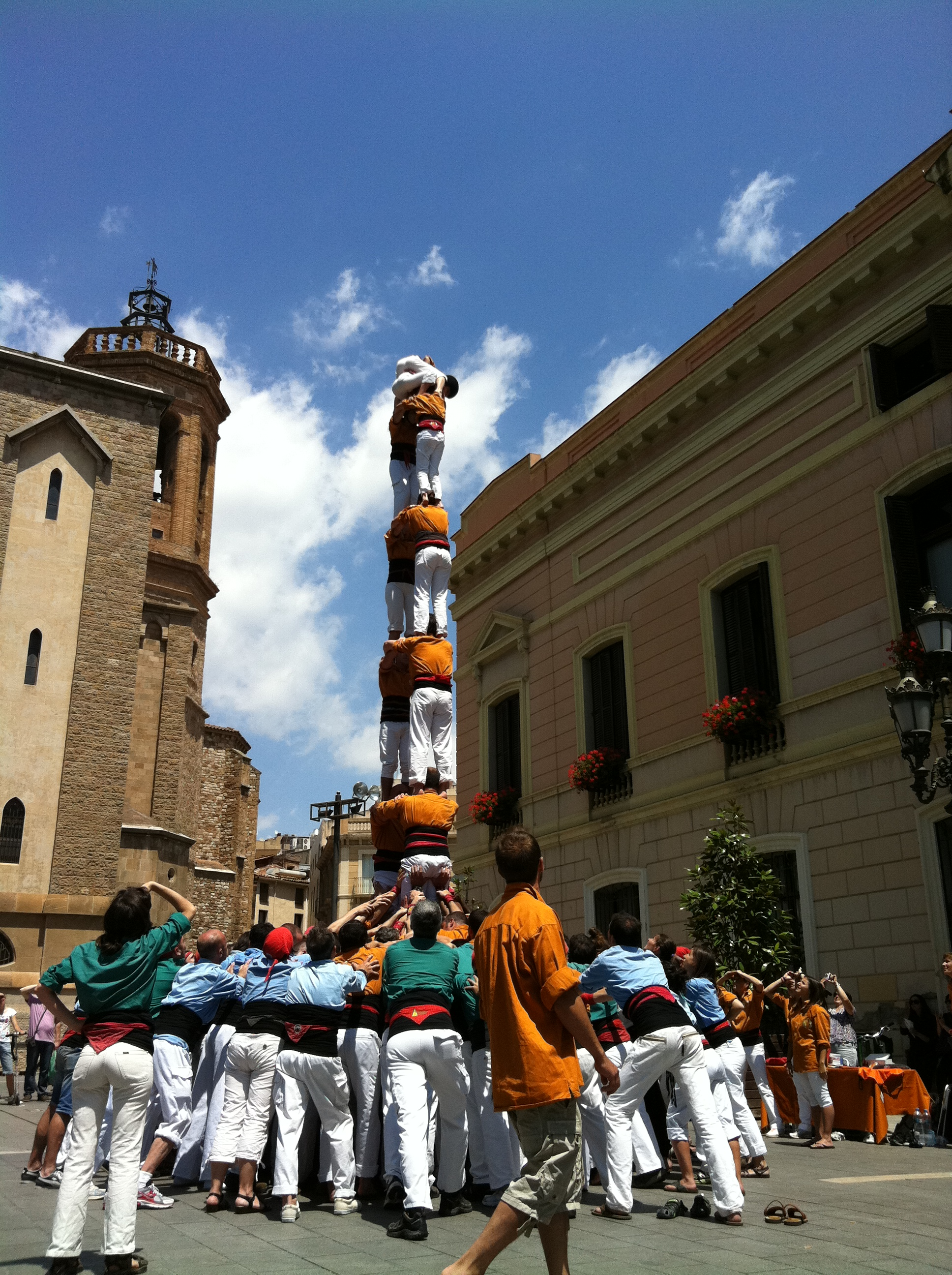 2 de 7 dels Sagals d'Osona en l'actuació castellera a la plaça de Sant Roc de Sabadell el 19 de juny del 2011 durant la sisena trobada de "Sabadell. Festa i Tradició" Sagals d'Osona a Sabadell juny de 2011